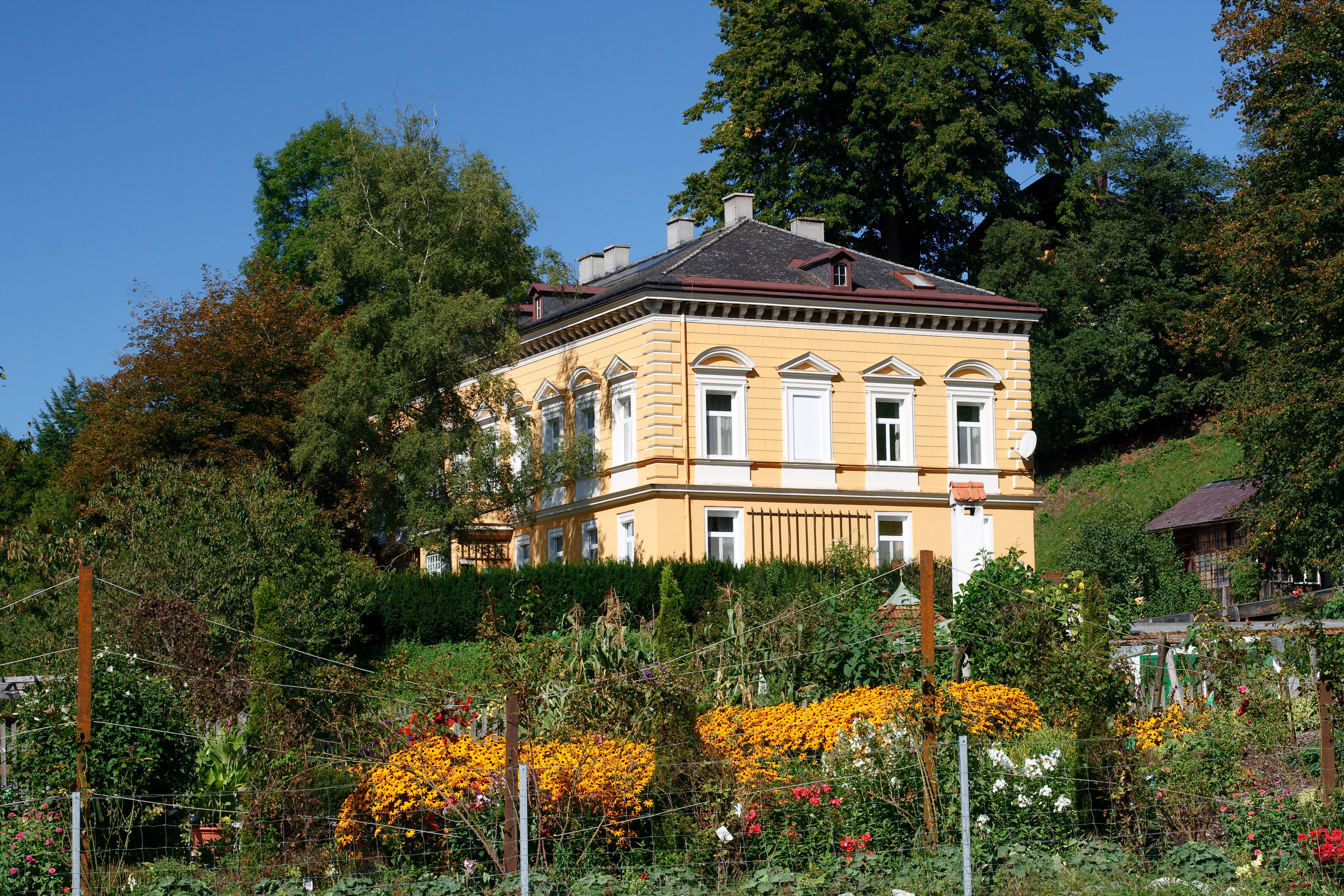 Das Neue Herrenhaus im Ensemble Schmiedleithen (Grünburg, Oberösterreich)